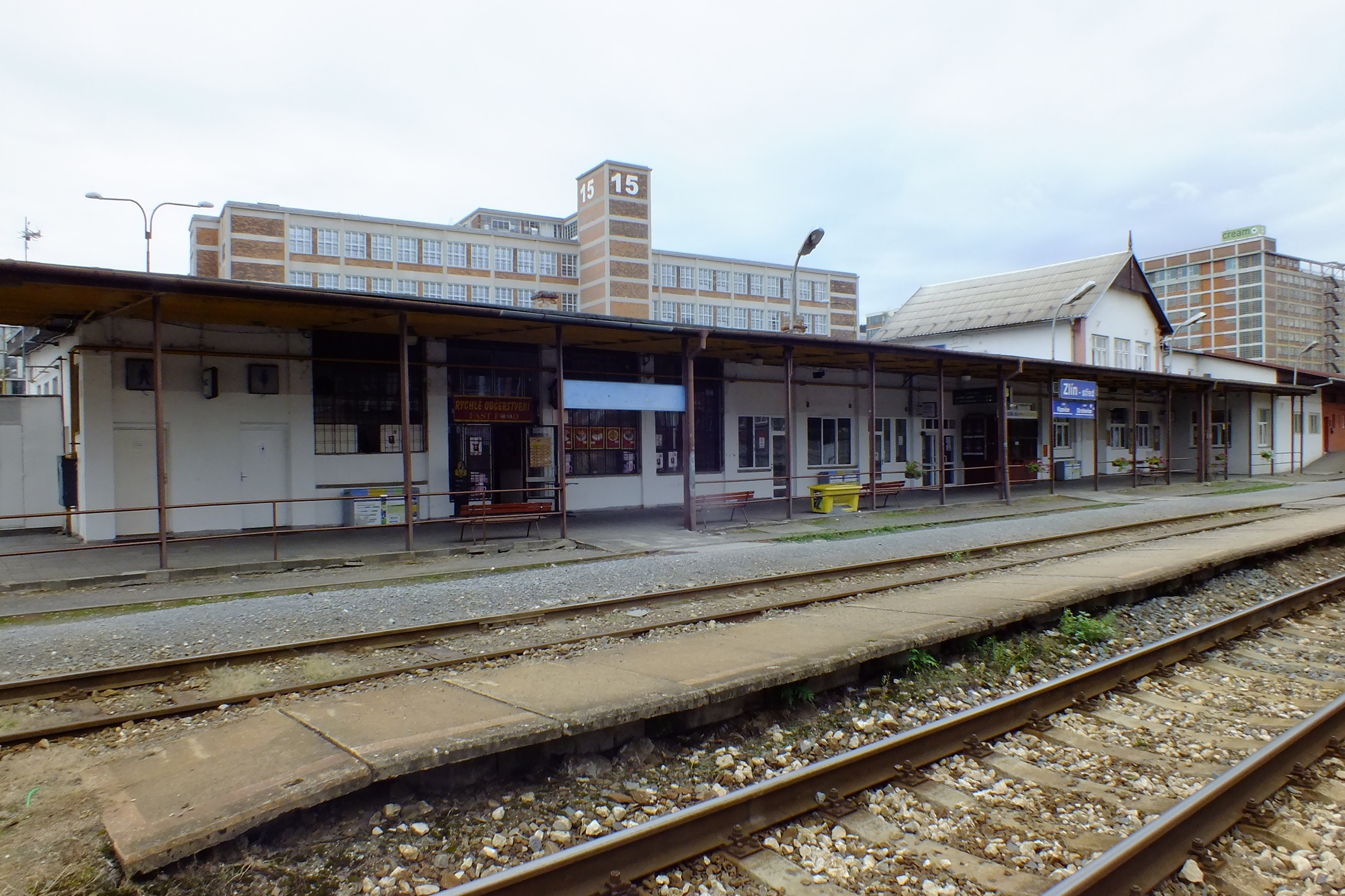 Staniční budova